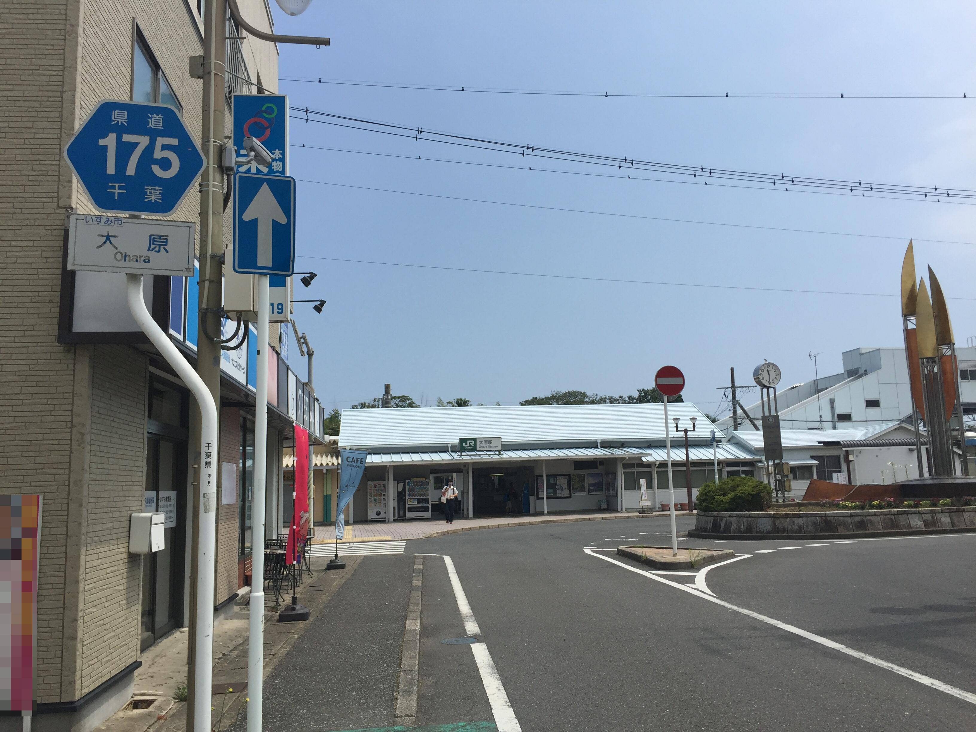 千葉県道172号（いすみ市大原、JR大原駅前）